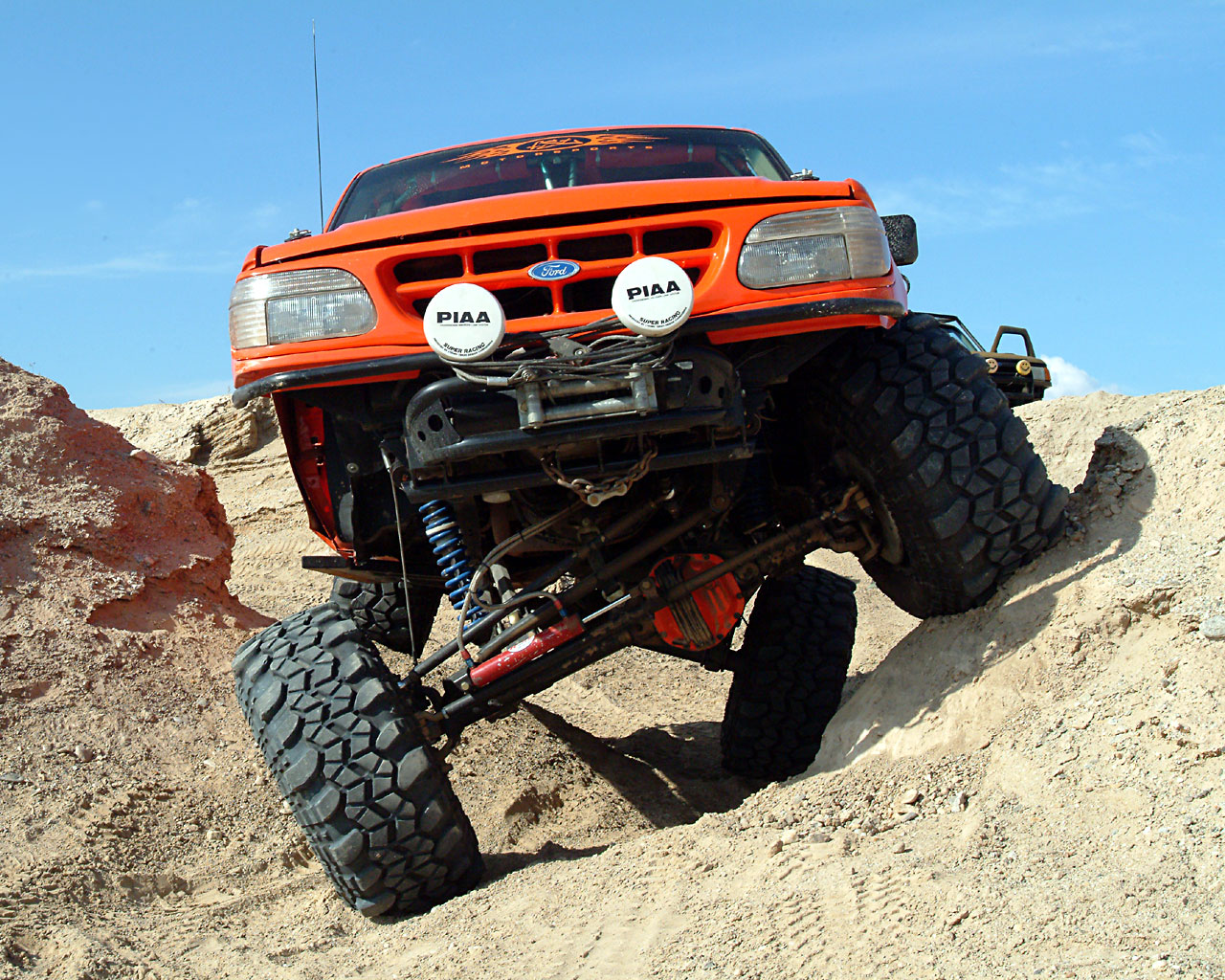 Ford Explorer Truck Haven Hills event.